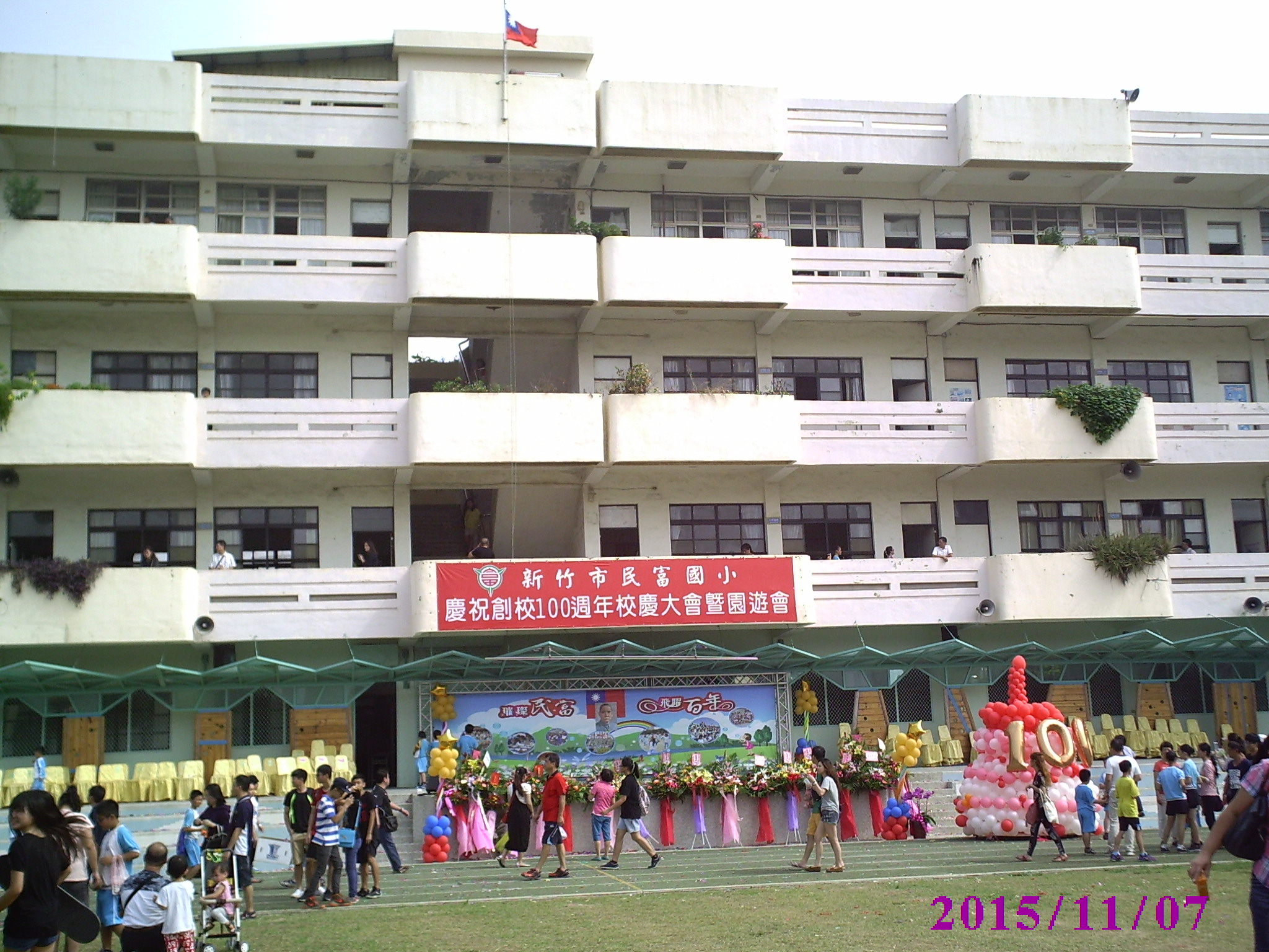 新竹市北區民富國民小學一百週年校慶。